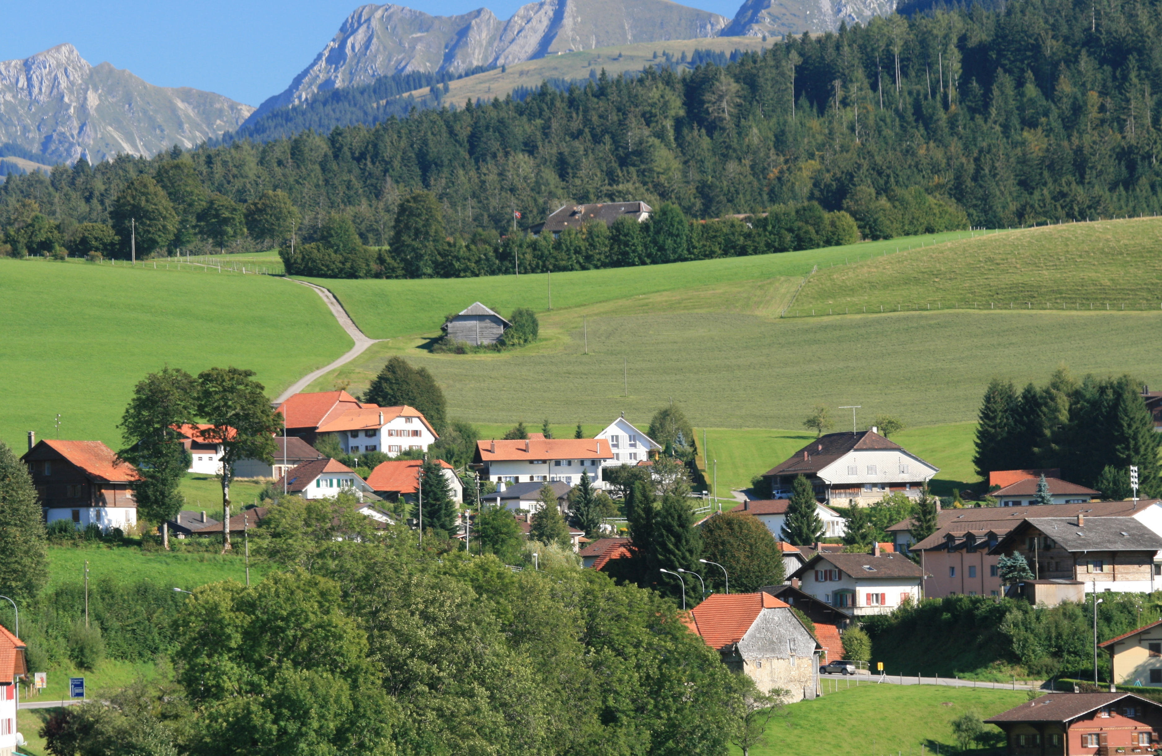 Plasselb, Kanton Freiburg, Schweiz